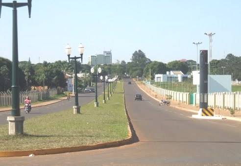 Avenida Caarapó, na cidade de Naviraí, no Brasil